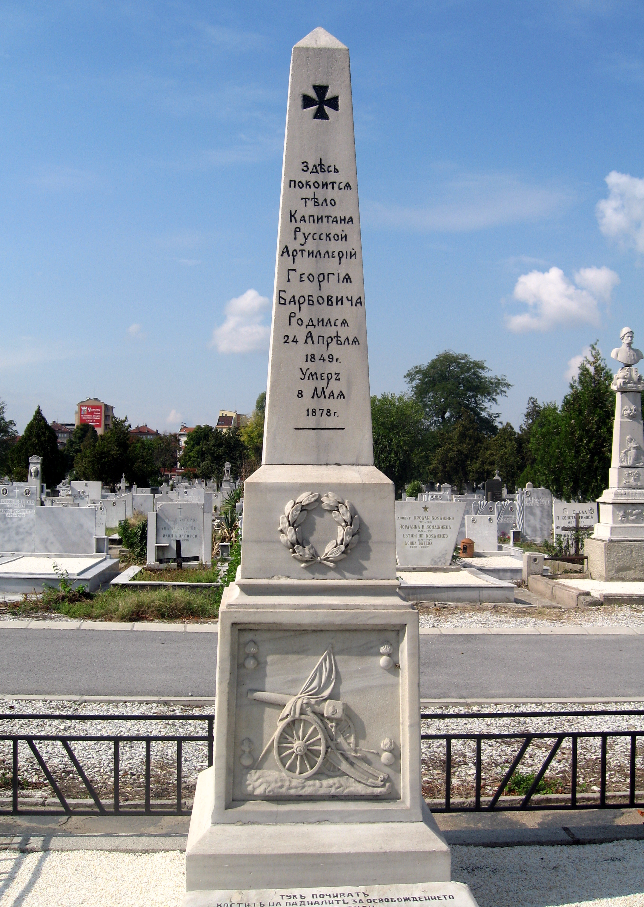 Надгробен паметник в Пловдив на Георги Барбович, капитан от руската артилерия. Роден на 24 април 1849 г. Починал на 8 май 1878 г.